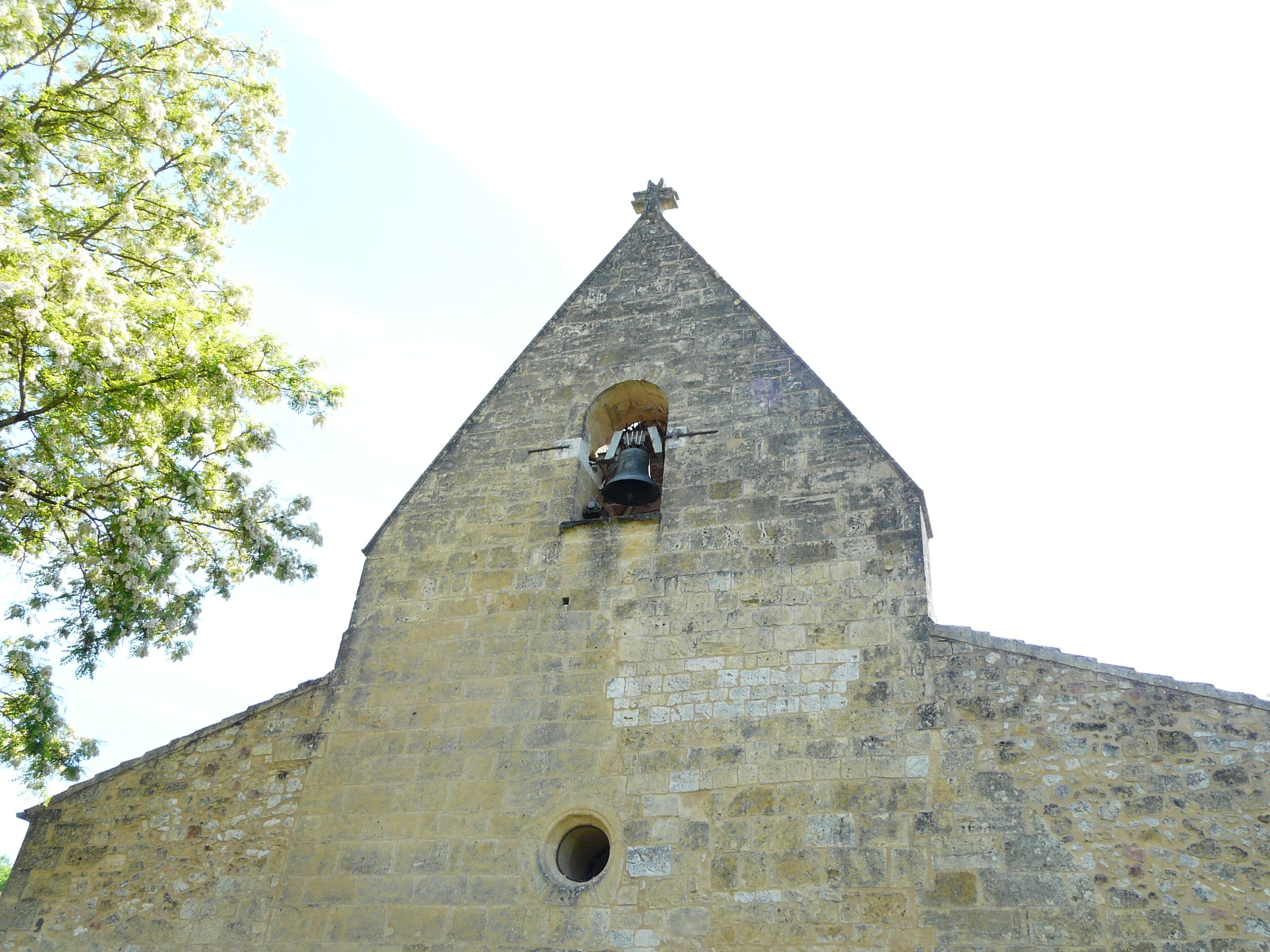 Le clocher-mur de l'église Saint-Martial de Monsac, Dordogne, France.